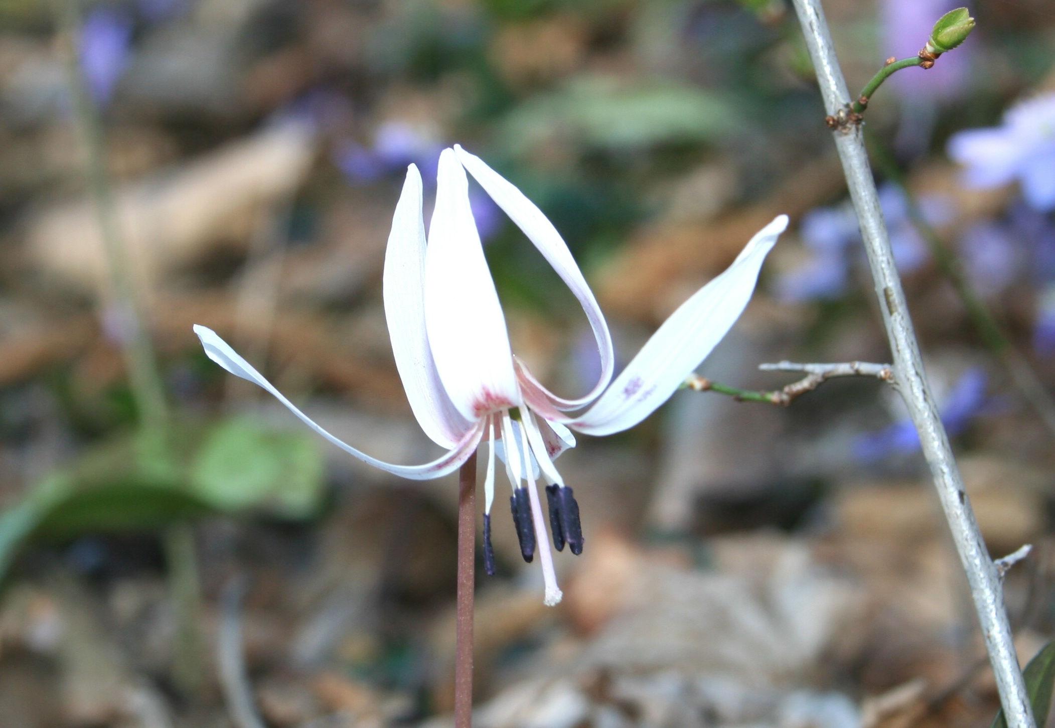 Erythronium_dens-canis (Dente di Cane) Località : Visome (BL), 350 m s.l.m.